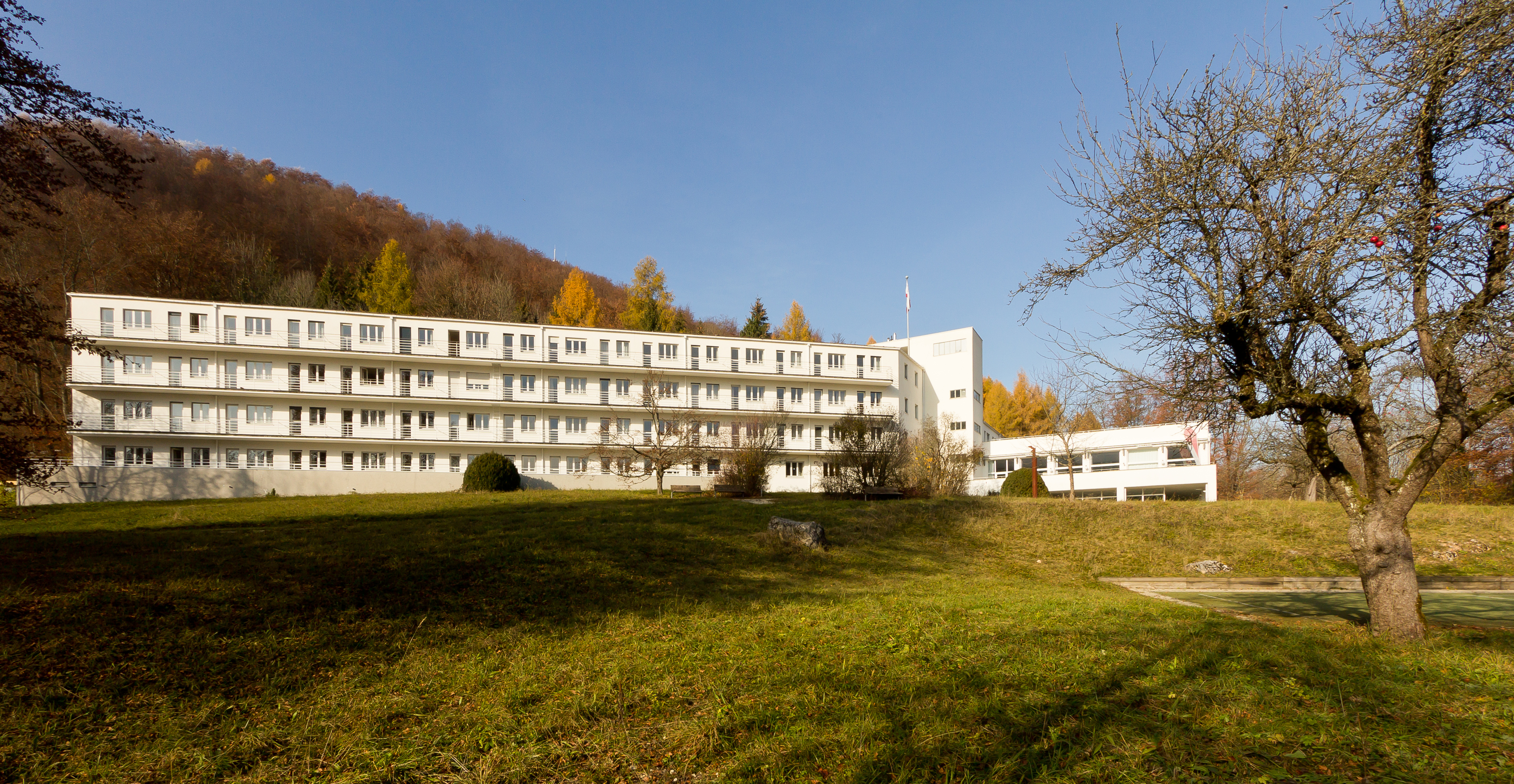 Das Haus auf der Alb, denkmalgeschützt, Rückseite, Bad Urach im Herbst 2011